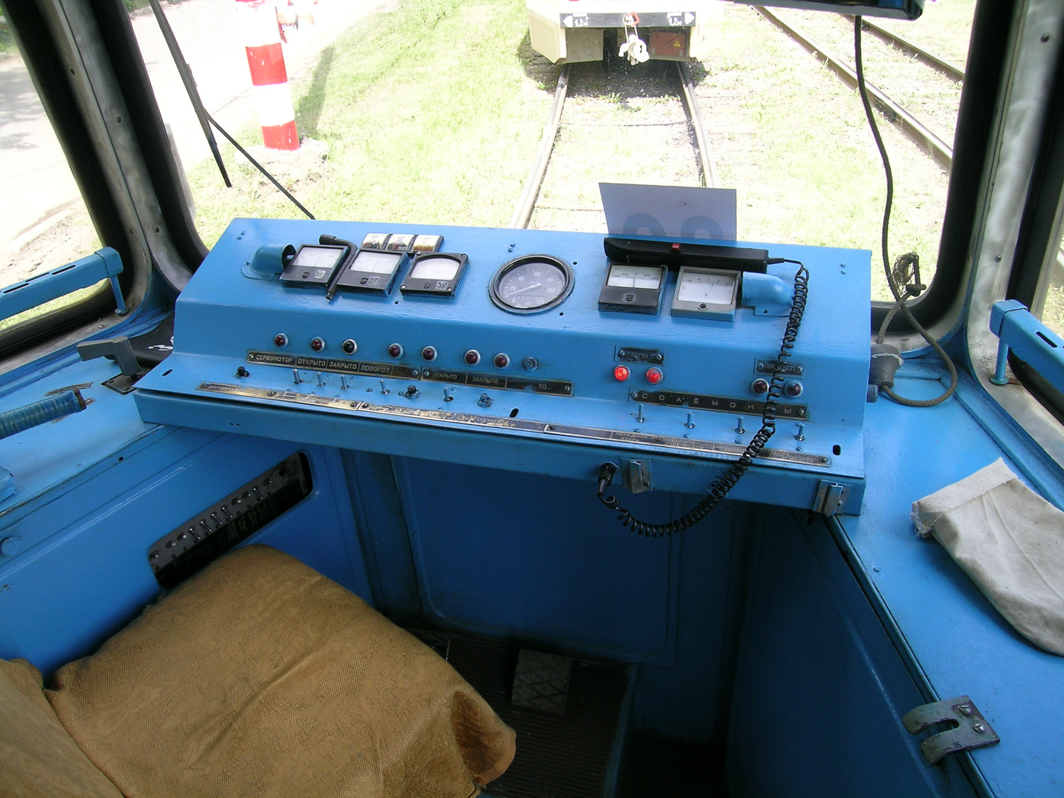 Пульт управления трамвайным вагоном 71-605 (КТМ-5).